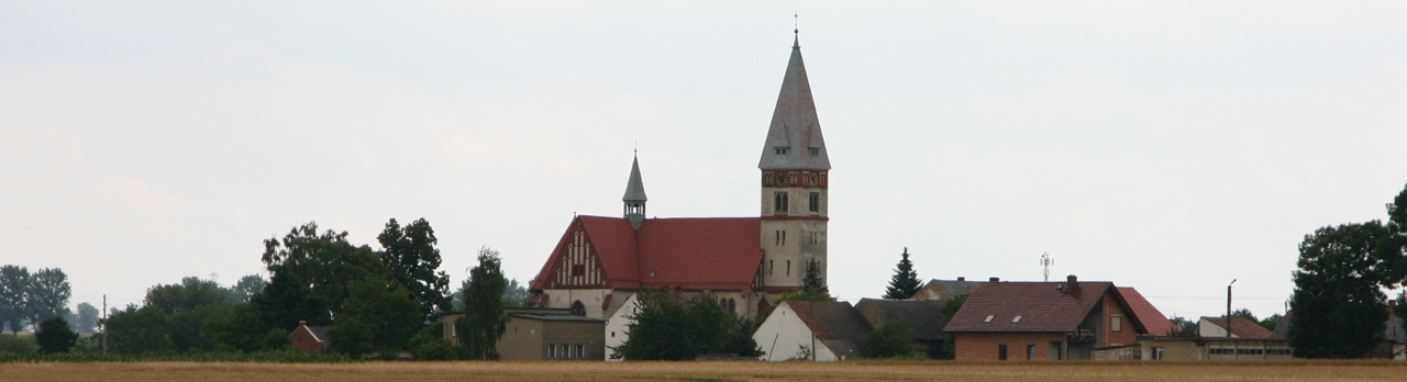 Ligota Bialska (dodatkowa nazwa w j. niem. Ellguth) – wieś w Polsce położona w województwie opolskim, w powiecie prudnickim, w gminie Biała.